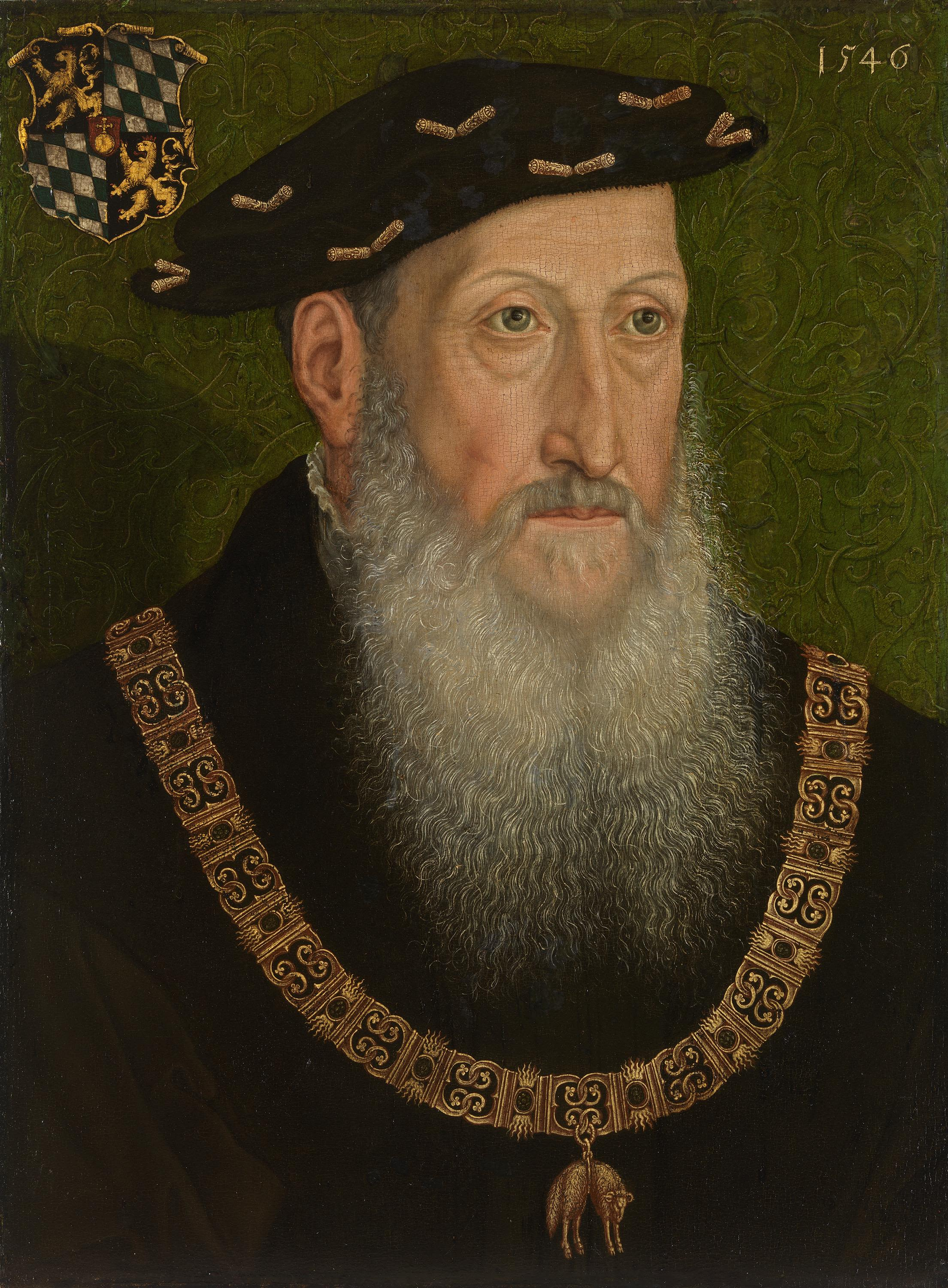 Bildnis des Kurfürsten Friedrich II. des Weisen von der Pfalz